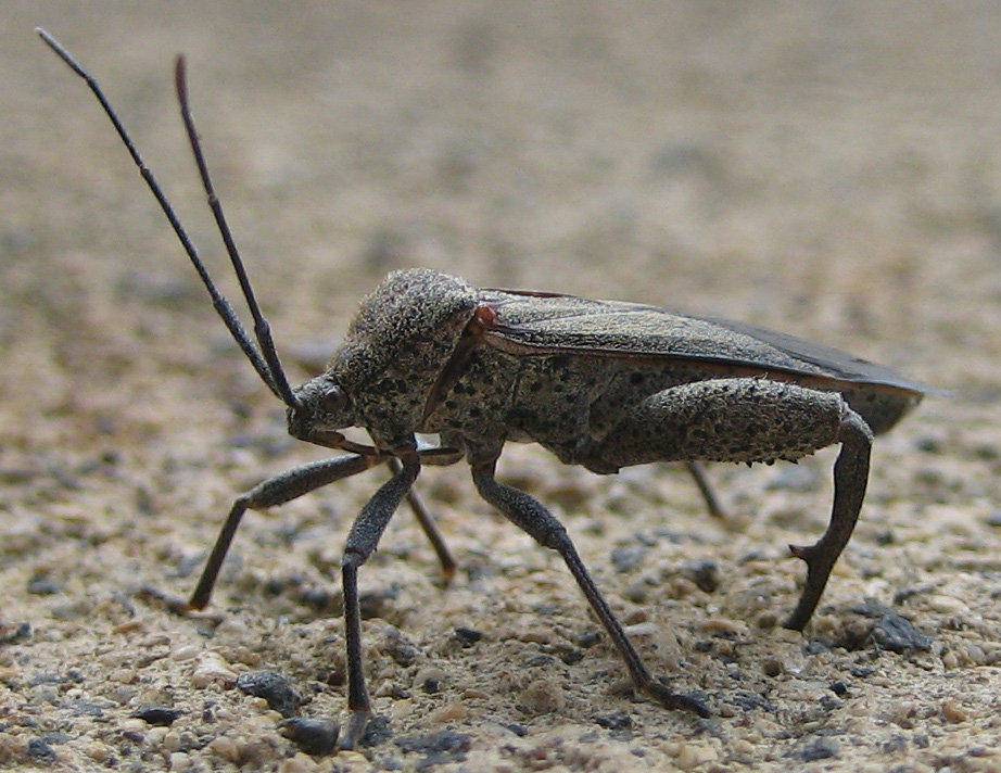 Physomerus grossipes, aka as Sweet Potato Bug.